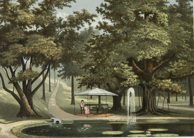 Litho. Litho naar een oorspronkelijke aquarel van J.C. Rappard.. Een vijver met fontein in de plantentuin van Buitenzorg